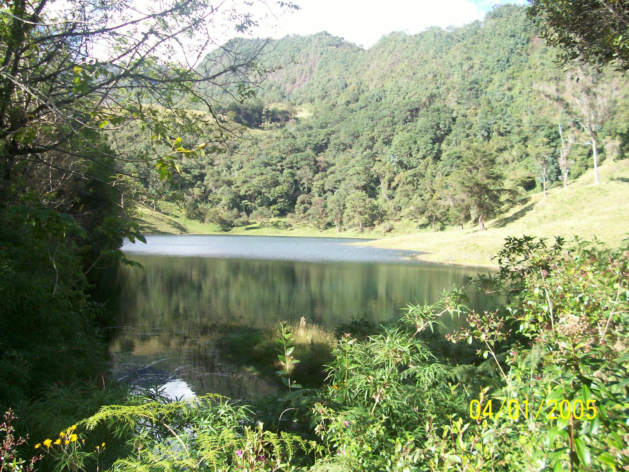 laguna VERDE DE UBALA